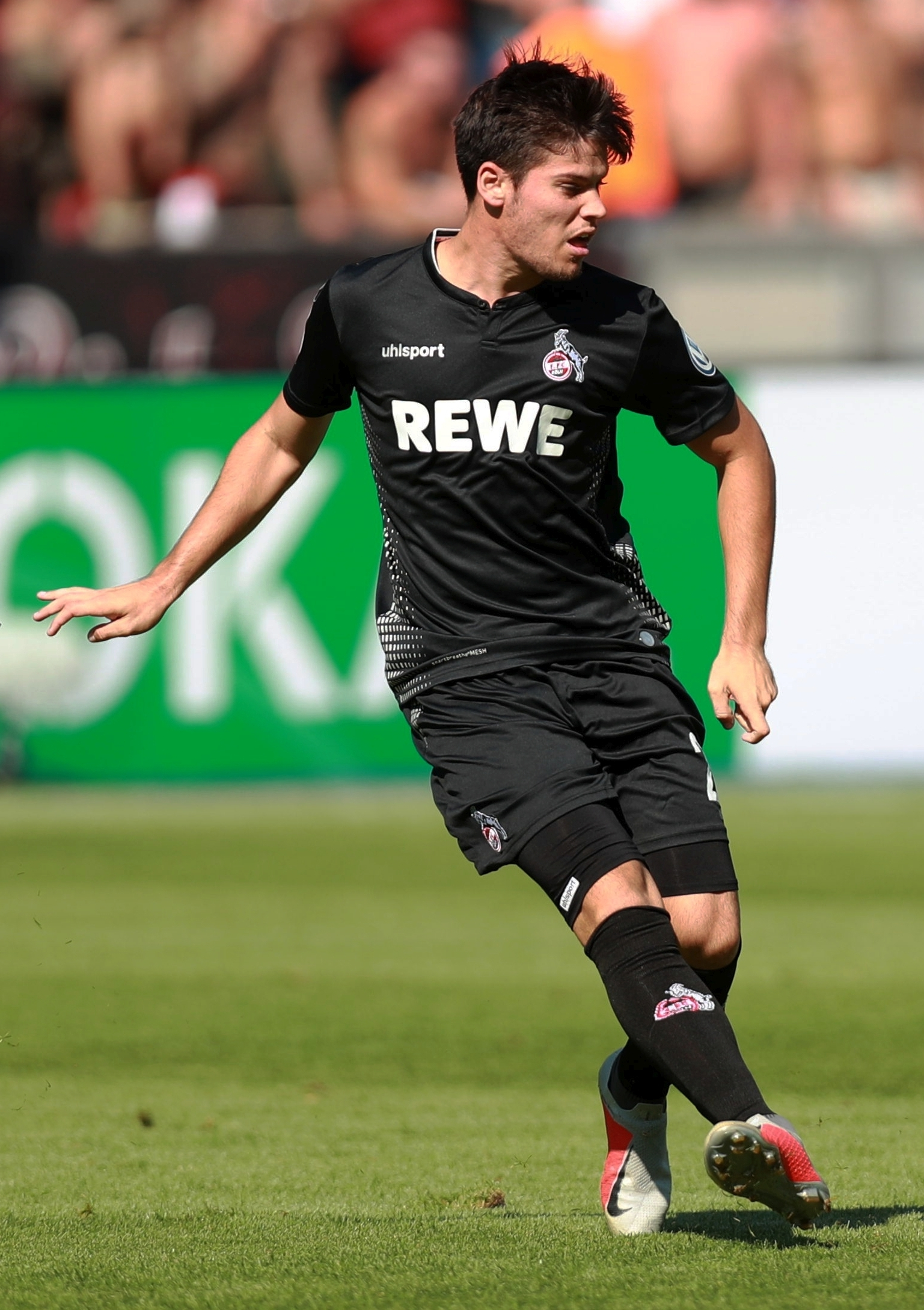 DFB-Pokal 2018/19, 1. Hauptrunde: BFC Dynamo gegen 1. FC Köln 1:9 (1:4)